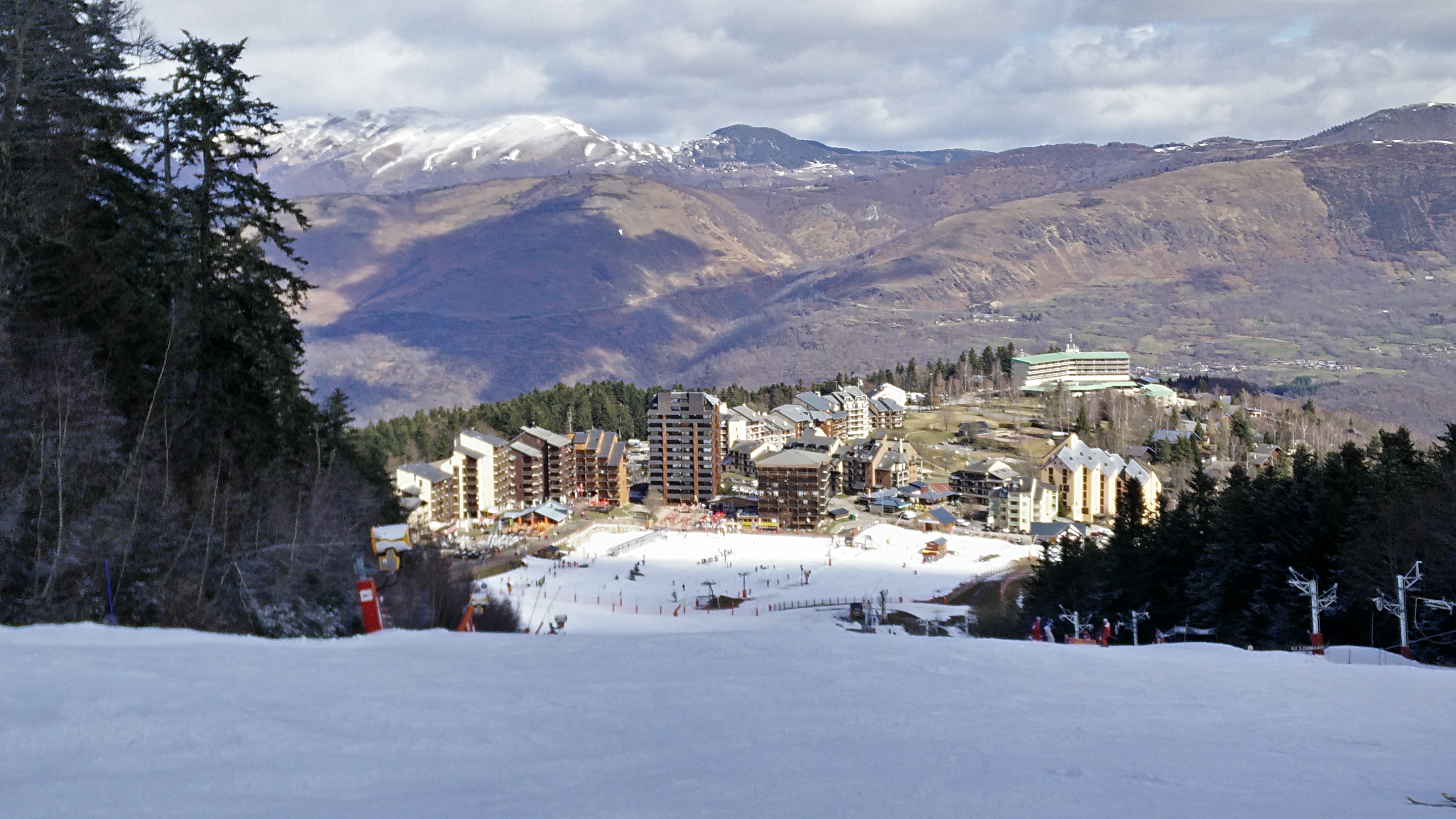 Vue de la station Ax 3 domaines (secteur Bonascre) depuis la piste bleue de même nom. On distingue au pied de la piste l'espace Évolution, et la remontée mécanique Lisière à droite.